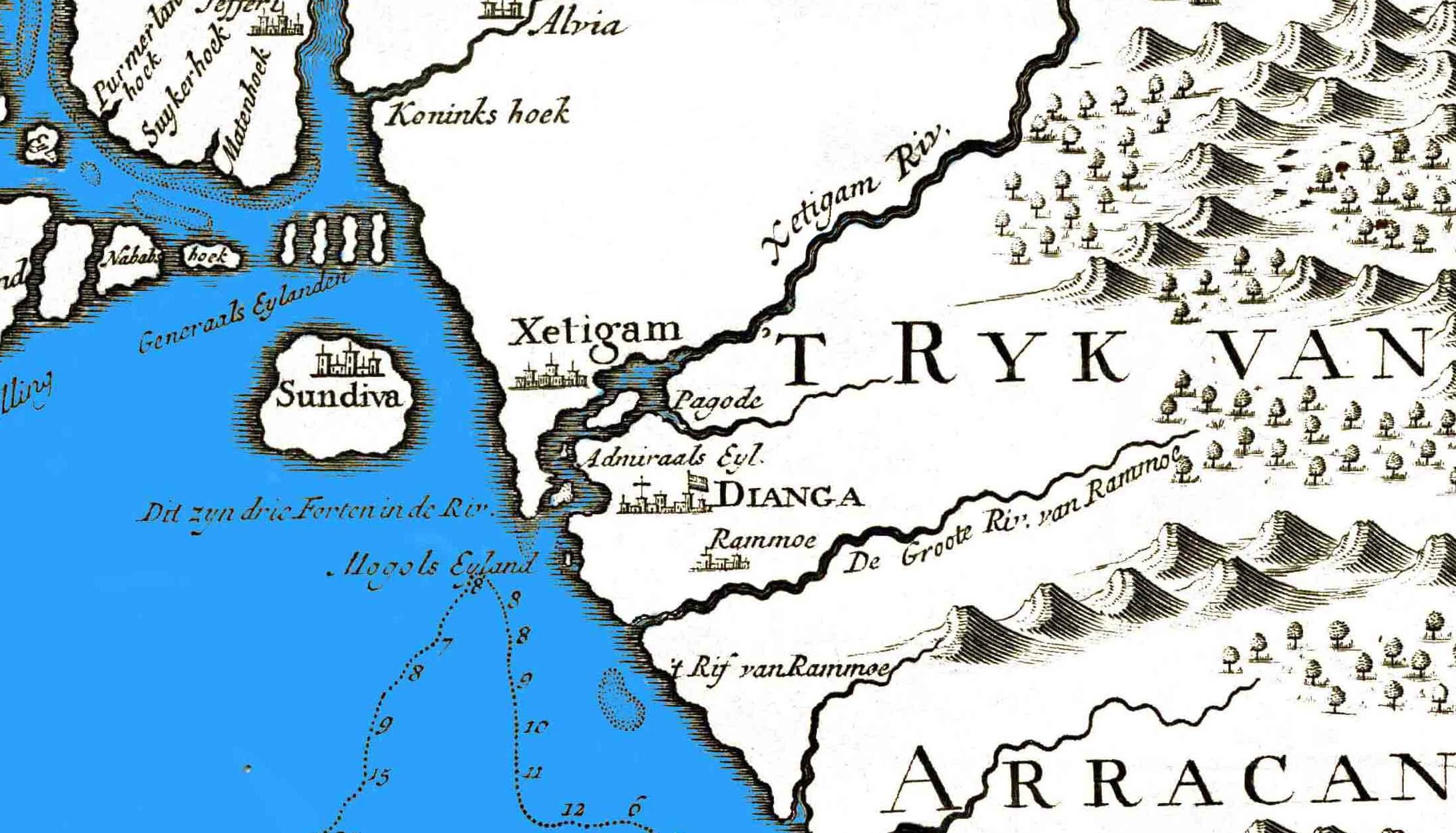 Extrato duma carta do Bengala, onde aparece a vila de Dianga, agora (1724) sob domínio holandez, Chittagong, e Sundiva.